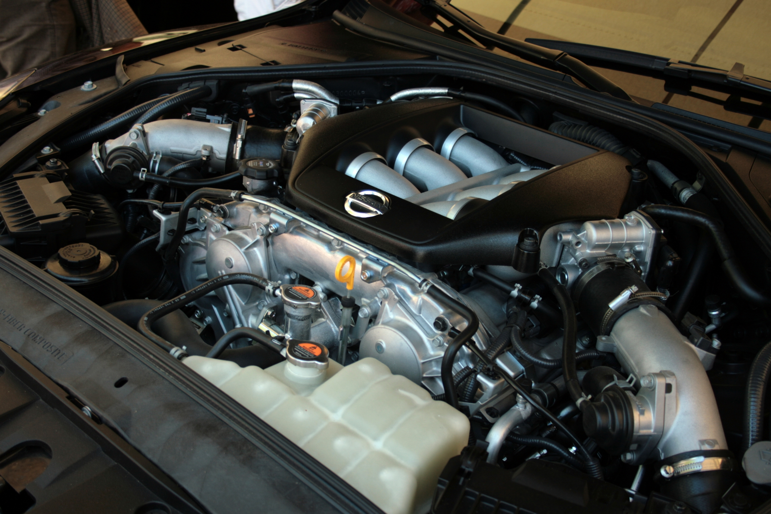 Nissan GT-R SpecV Engine